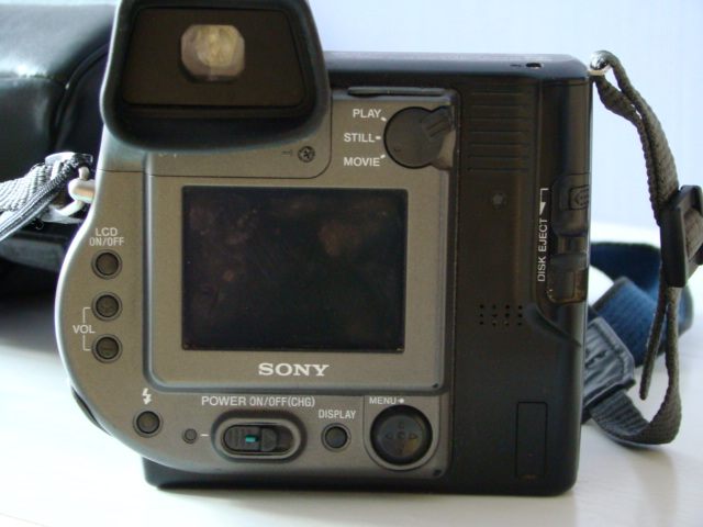 Face arrière de l'appareil photographique numérique Sony Mavica MVC-FD95